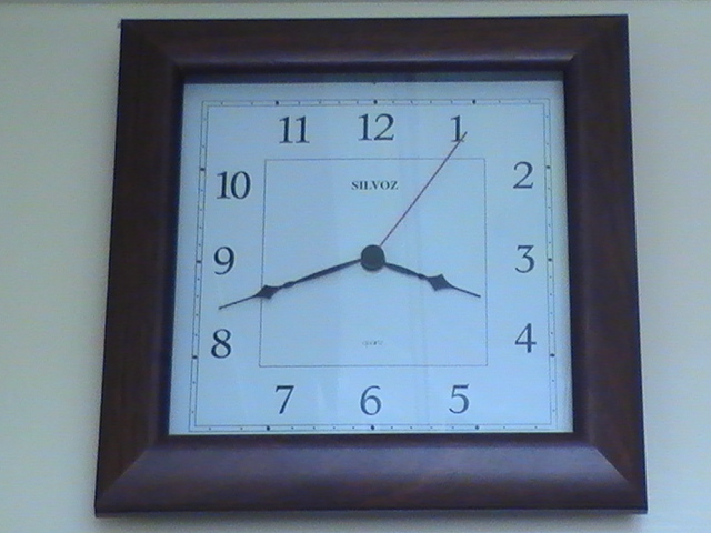 Horloge à quartz